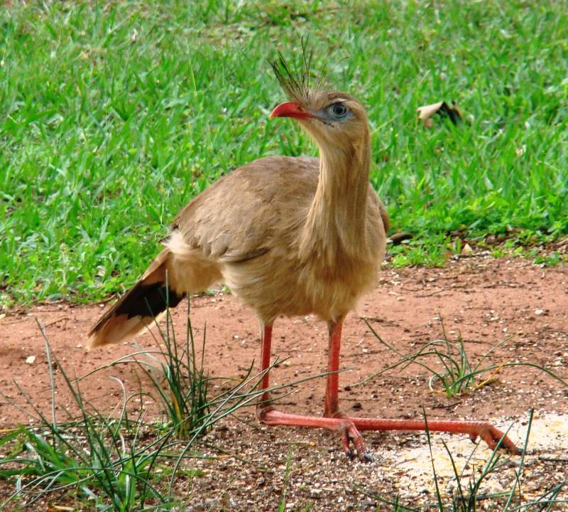 Red-legged Seriema Cariama cristata sitting to feed. Ourinhos, São Paulo, Brazil.